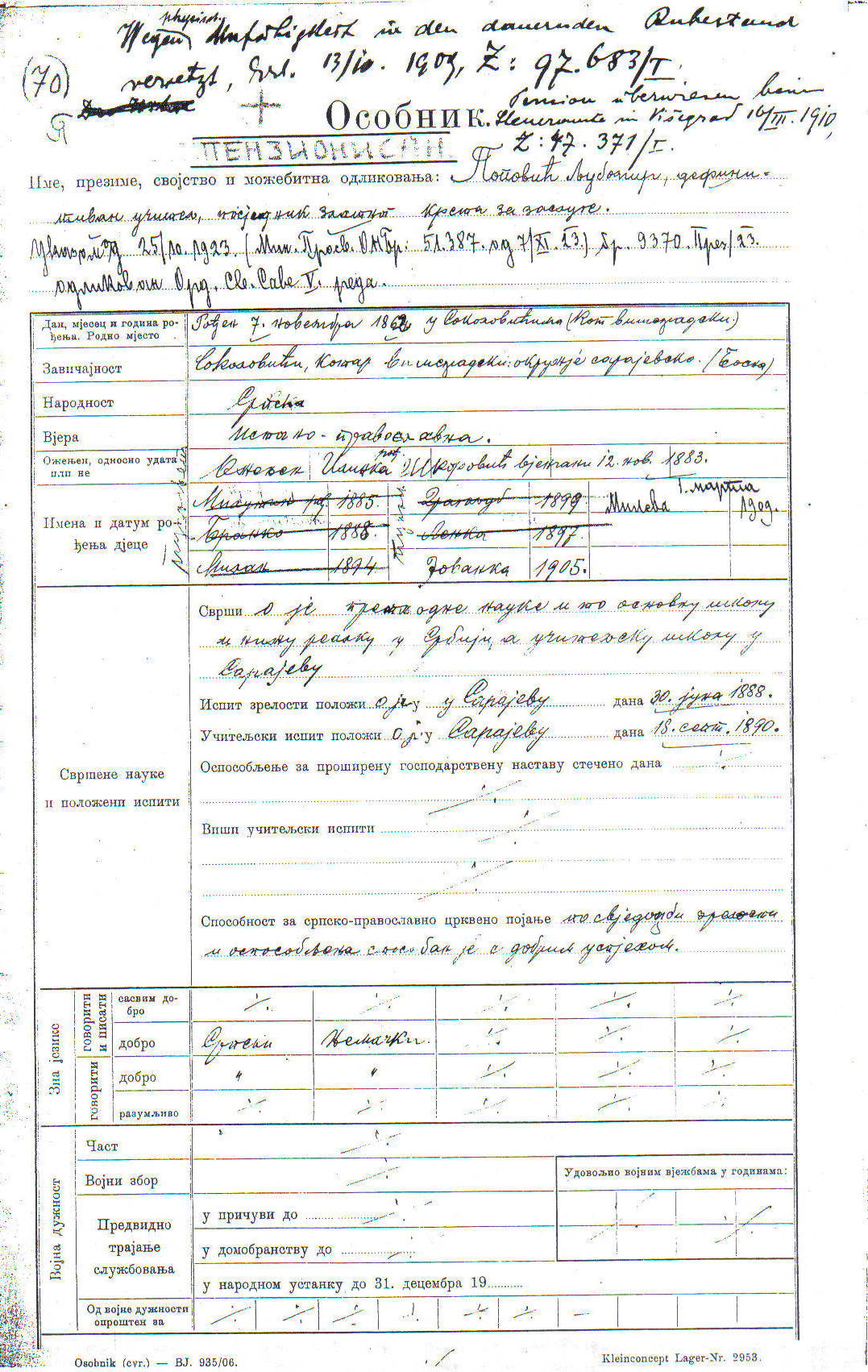 Српски (ћирилица): особник Љубомира Поповића